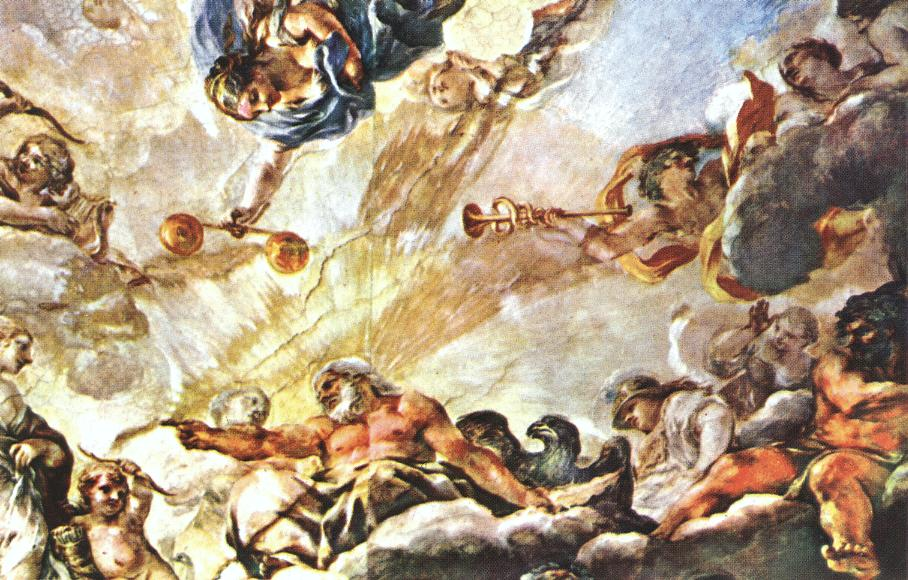 detail